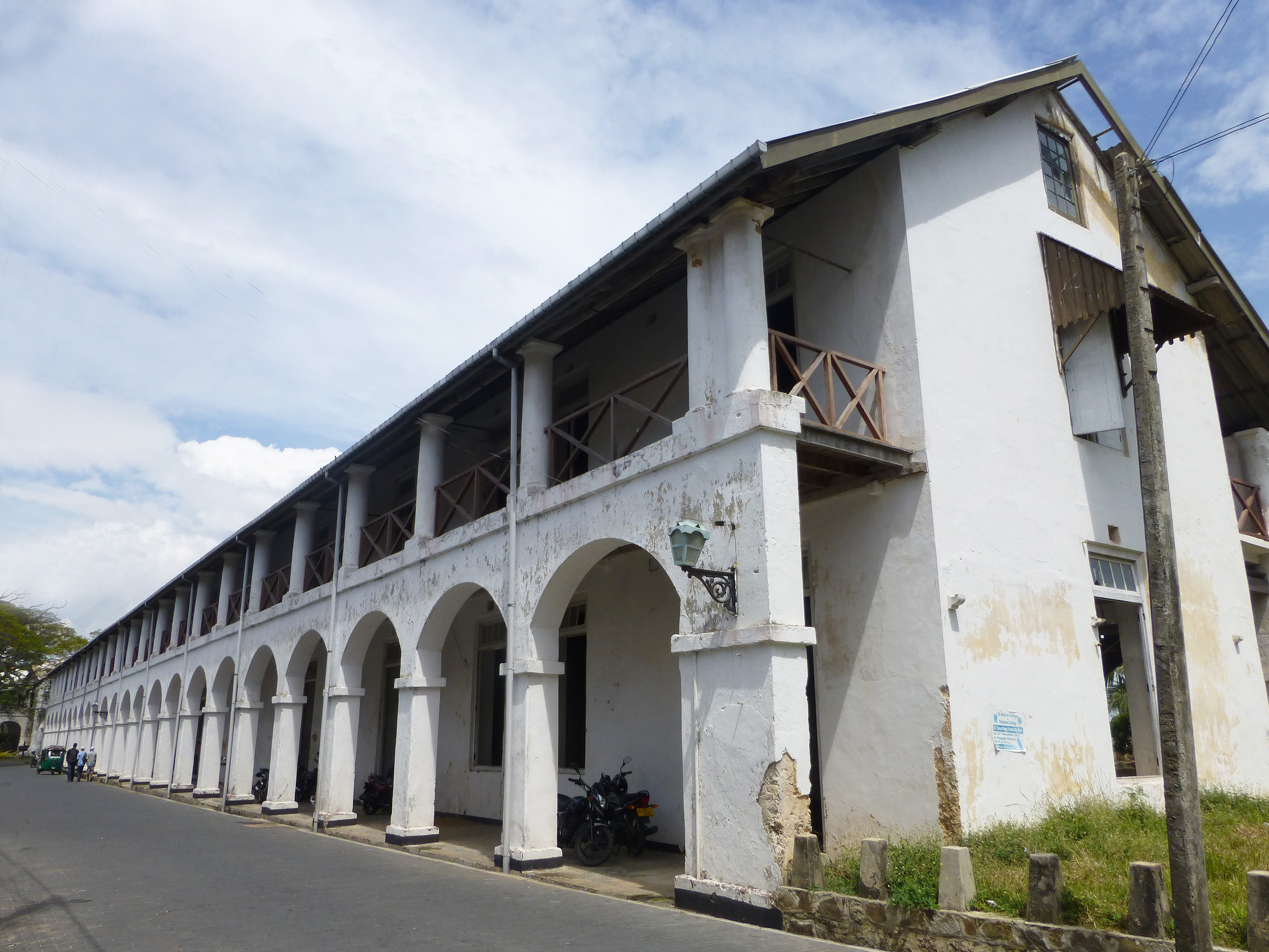 Galle (Sri Lanka) : ancien hôpital hollandais